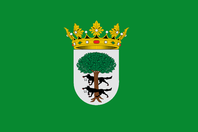 Bandera oficial del pueblo de Laudio/Llodio.